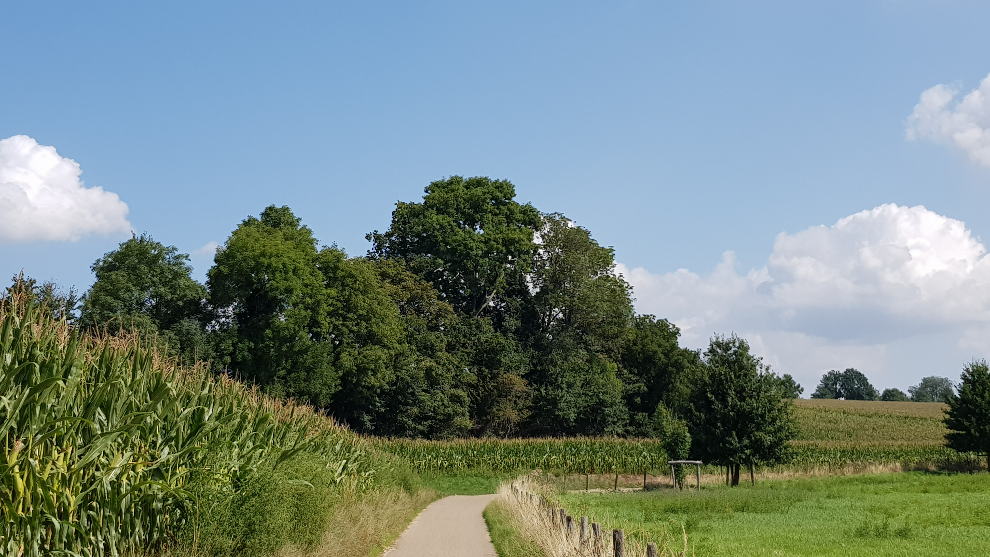 Auvermansboschke, Valkenburg aan de Geul, Nederland